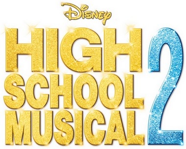 Logo du téléfilm High School Musical 2, deuxième volet de la triologie High School Musical.